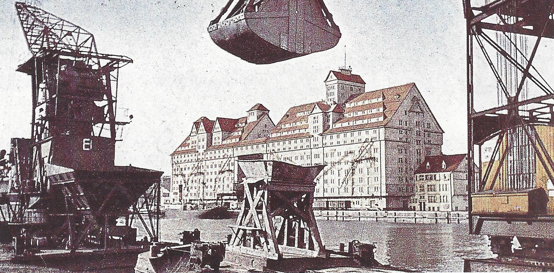 Gruppen- und Turmspeicher an der Nordostseite des neuen Industriehafens in Königsberg